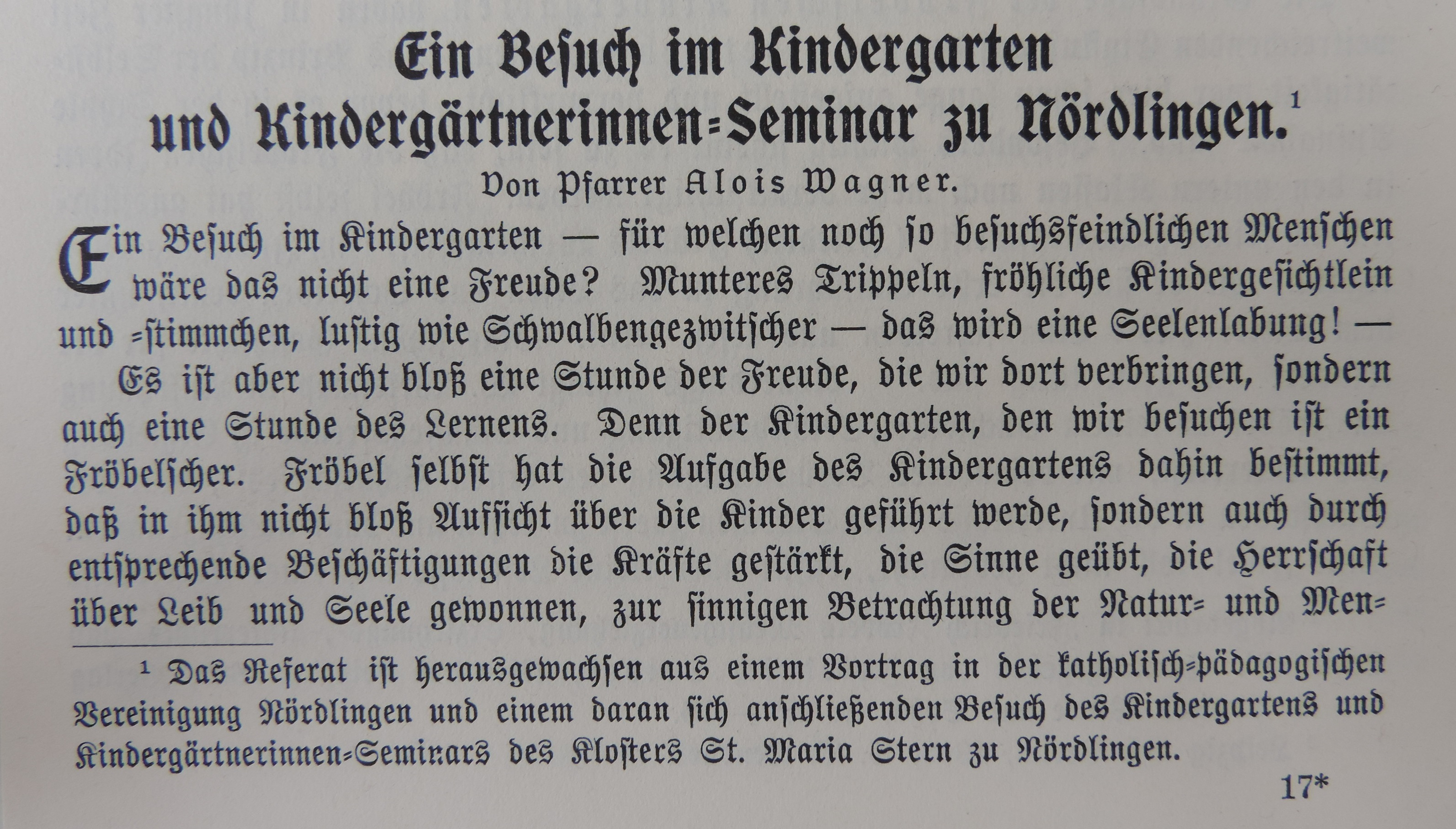 Protokoll eines Besuchs des Kindergärtnerinnenseminars in Nördlingen